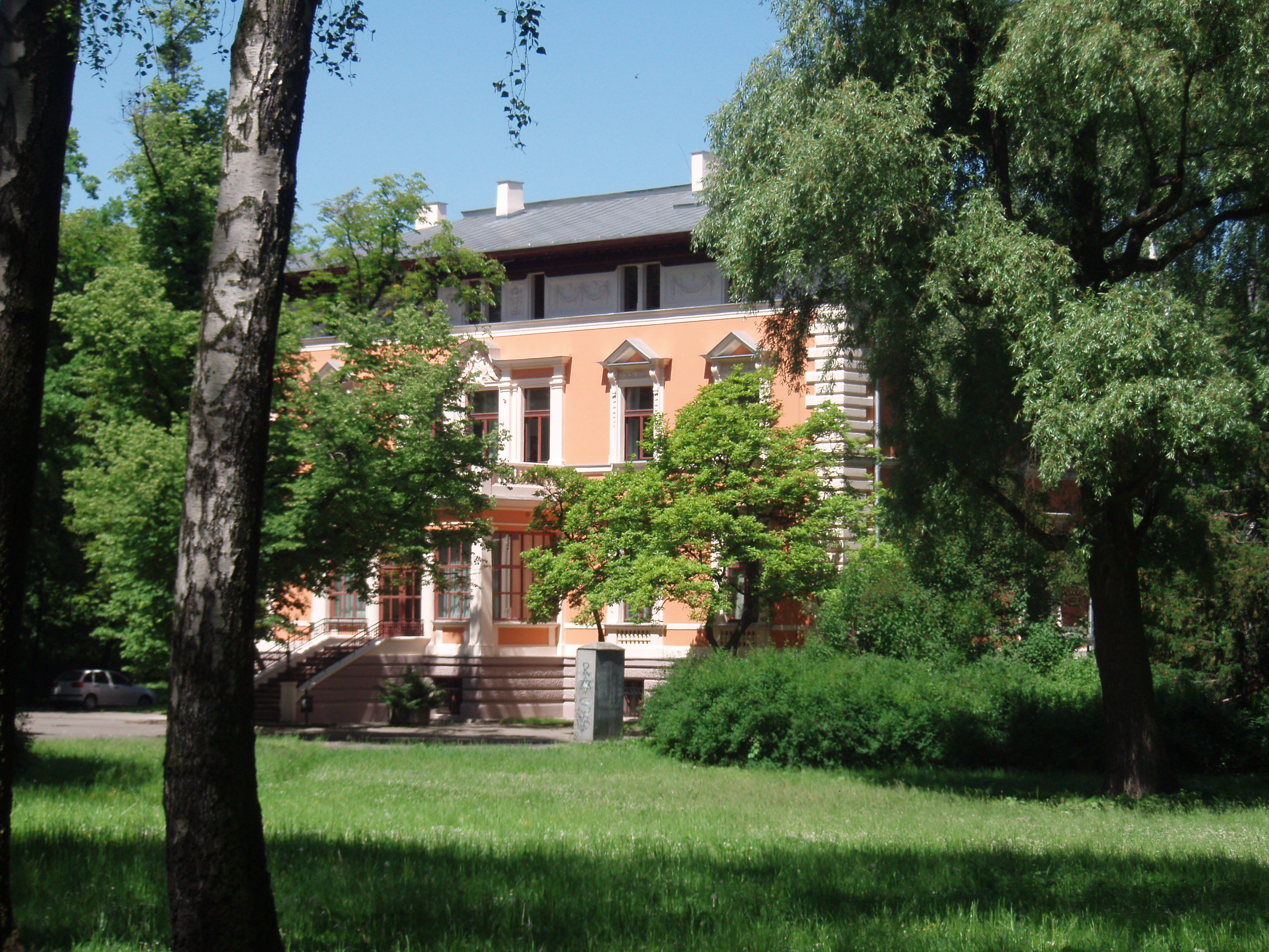 Budynek USC Łódź Górna w Parku im. Legionów, widok od południa